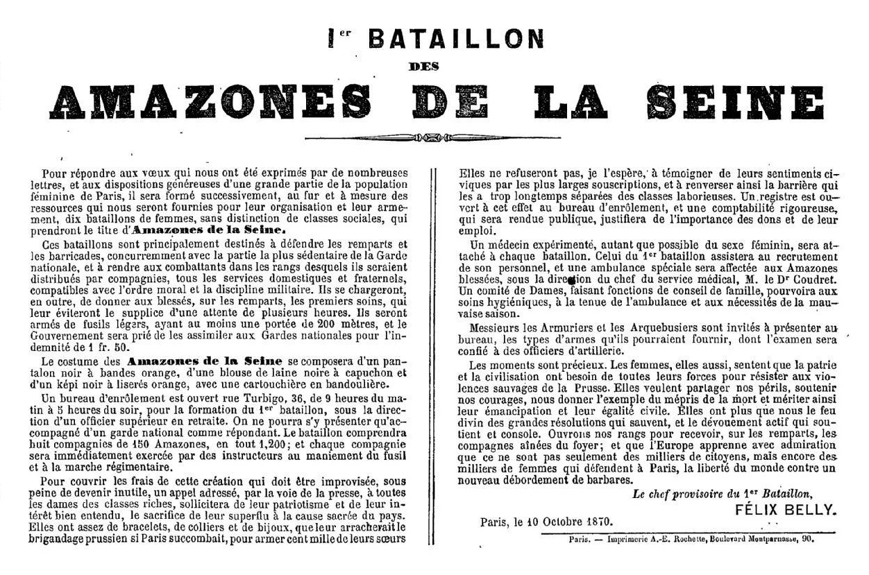 Annonce de la création des Amazones de la Seine.